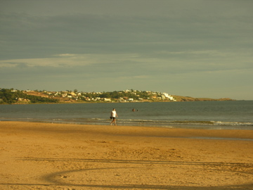 Punta ballena desde la playa portezuelo, mirando su lado oeste.